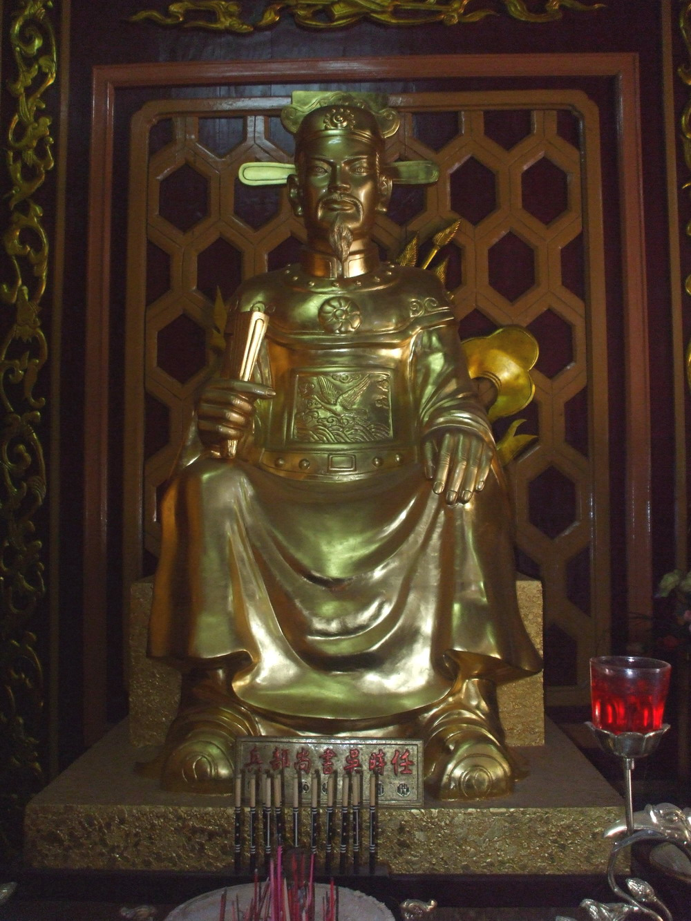 Tượng sĩ phu Ngô Thì Nhậm trong Điện thờ Tây Sơn Tam Kiệt (Bảo tàng Quang Trung, Bình Định, Việt Nam)